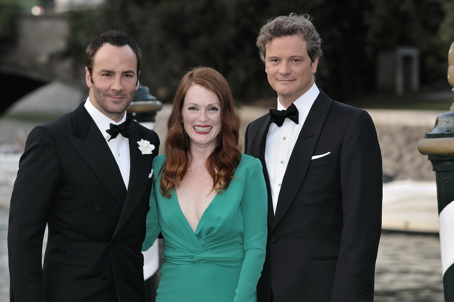 66ème Festival du Cinéma de Venise (Mostra), 10ème jour (11/09/2009) Arrivée au Lido de Colin Firth, Julianne Moore, Matthew Goode et le réalisateur Tom Ford pour le film : A sigle Man